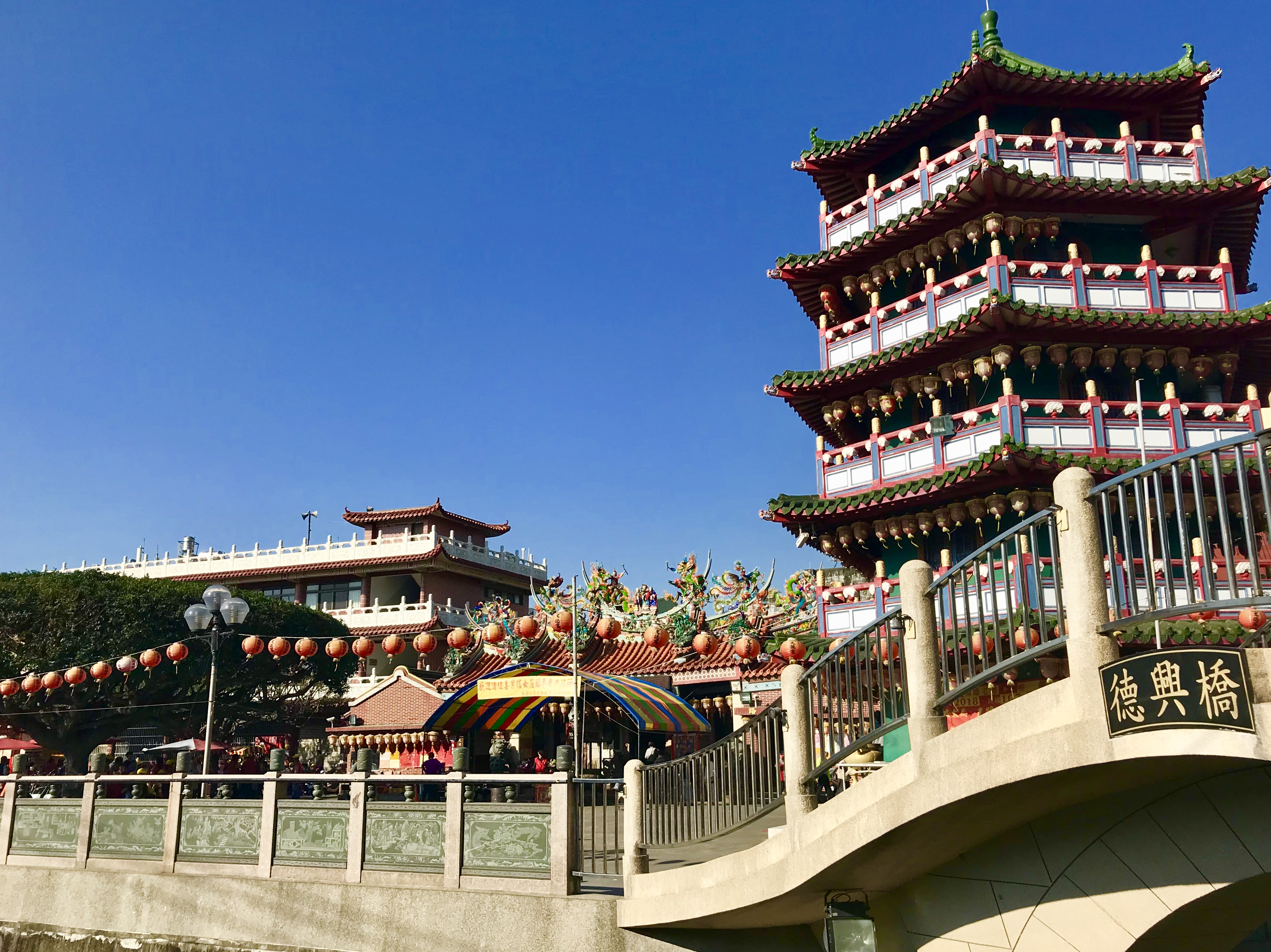 五營塔與白沙坑文德廟前殿